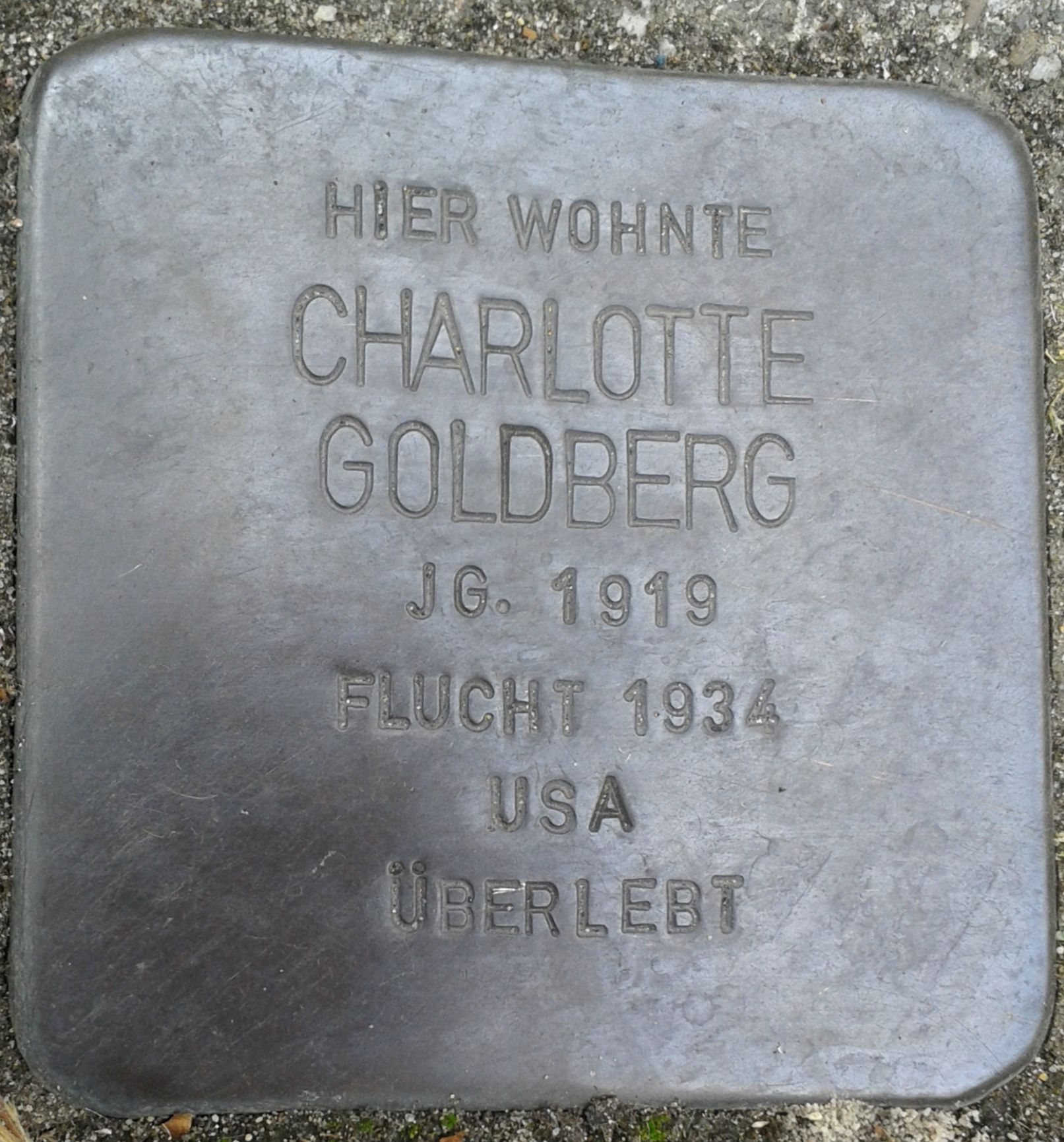 Stolperstein Datteln Carl-Gastreich-Straße 5 Charlotte Goldberg